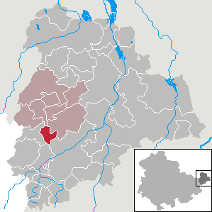 Drogen in Thuringia - District Altenburger Land